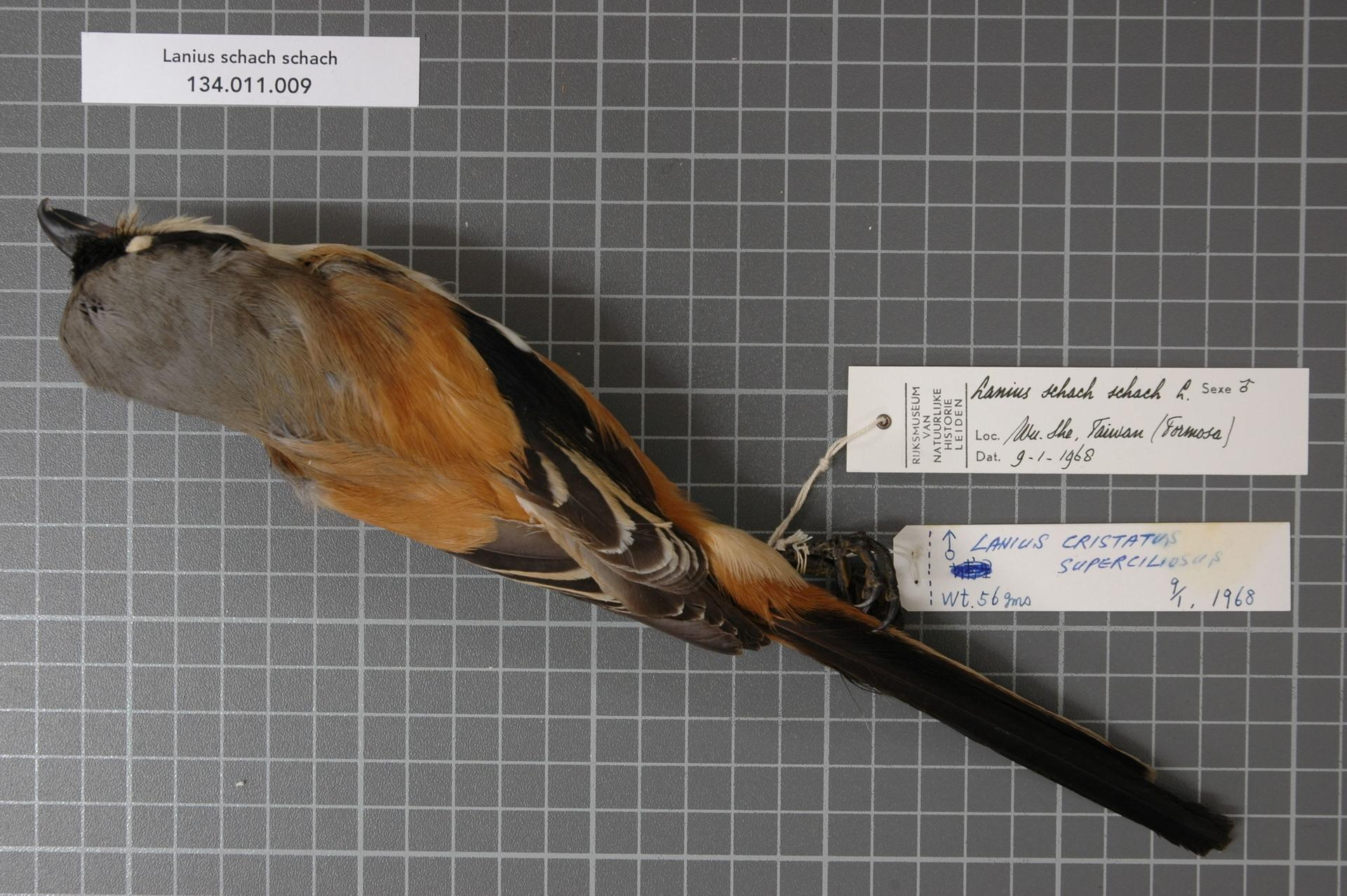 Lanius schach schach Linnaeus, 1758